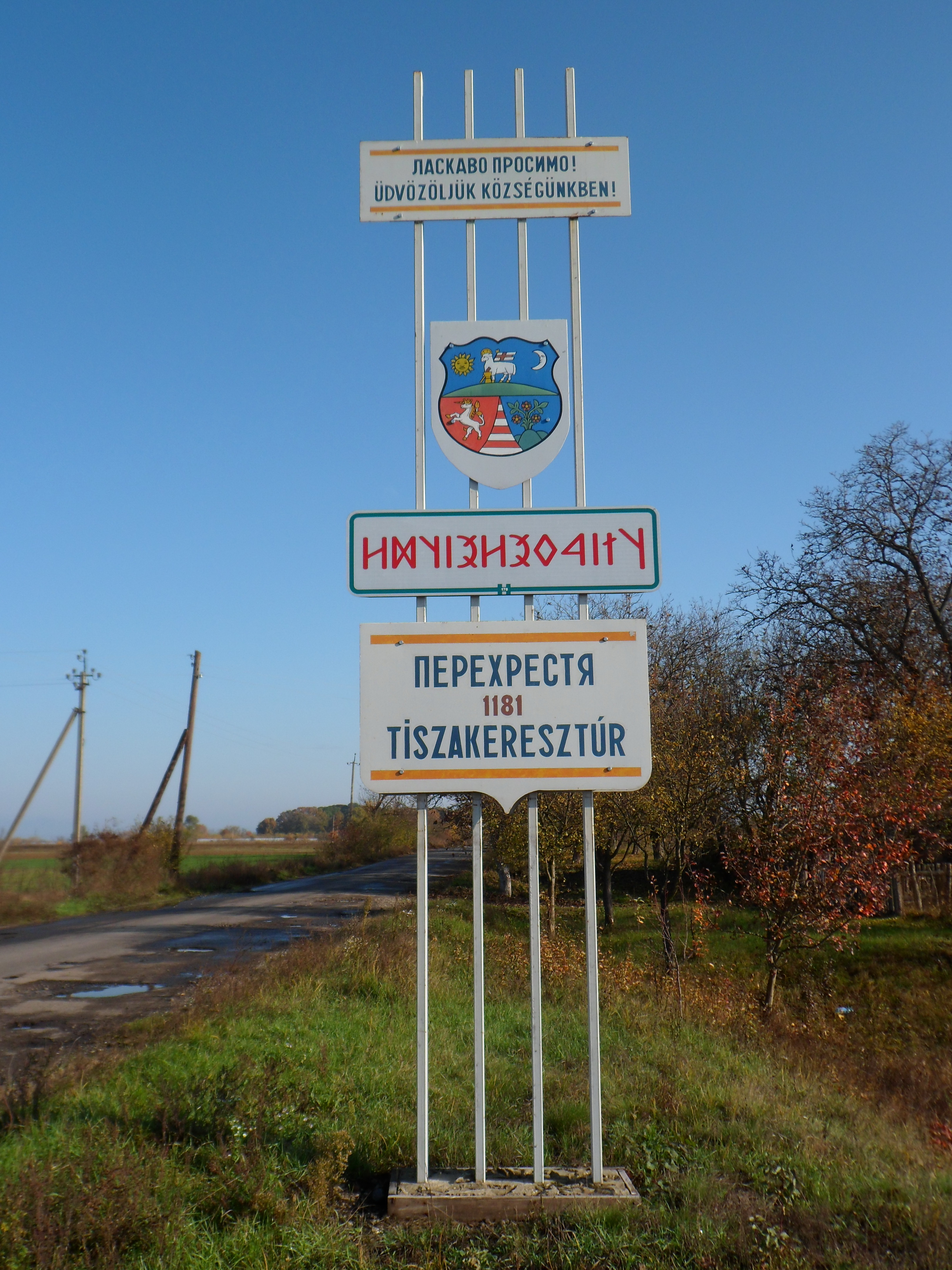 Helynév- és üdvözlőtábla Tiszakeresztúrban